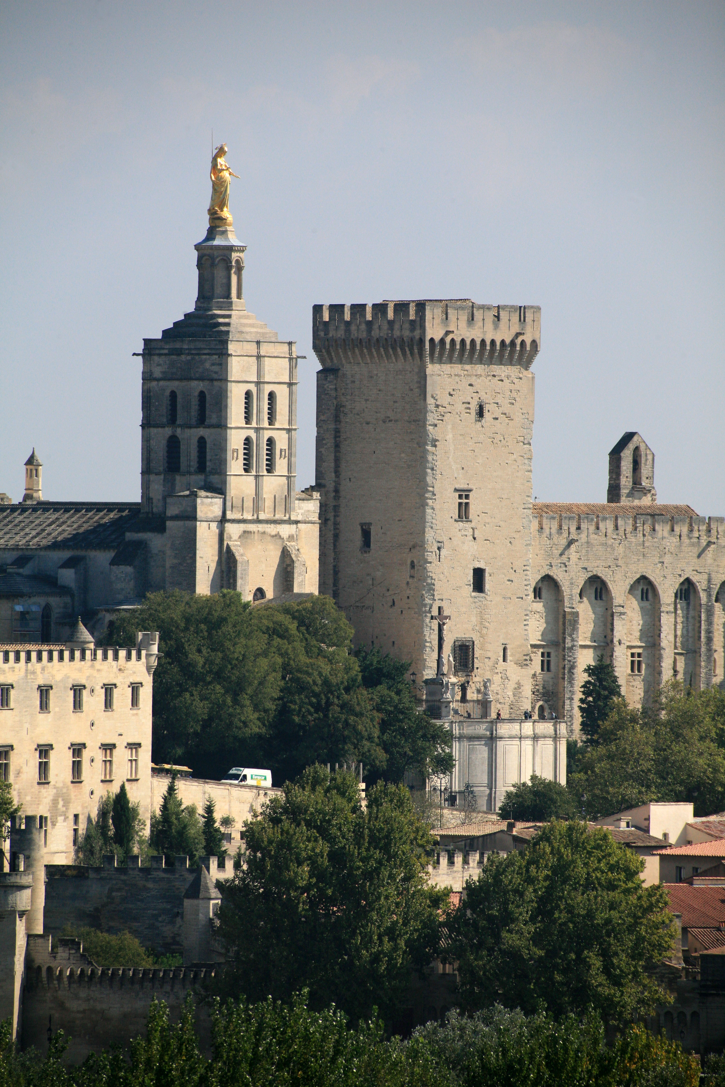 La tour de la Gache et Notre-Dame des Doms, Palais des Papes, Avignon